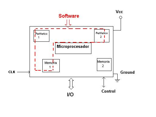 Microcontrolador=Microprocesador+Perifericos